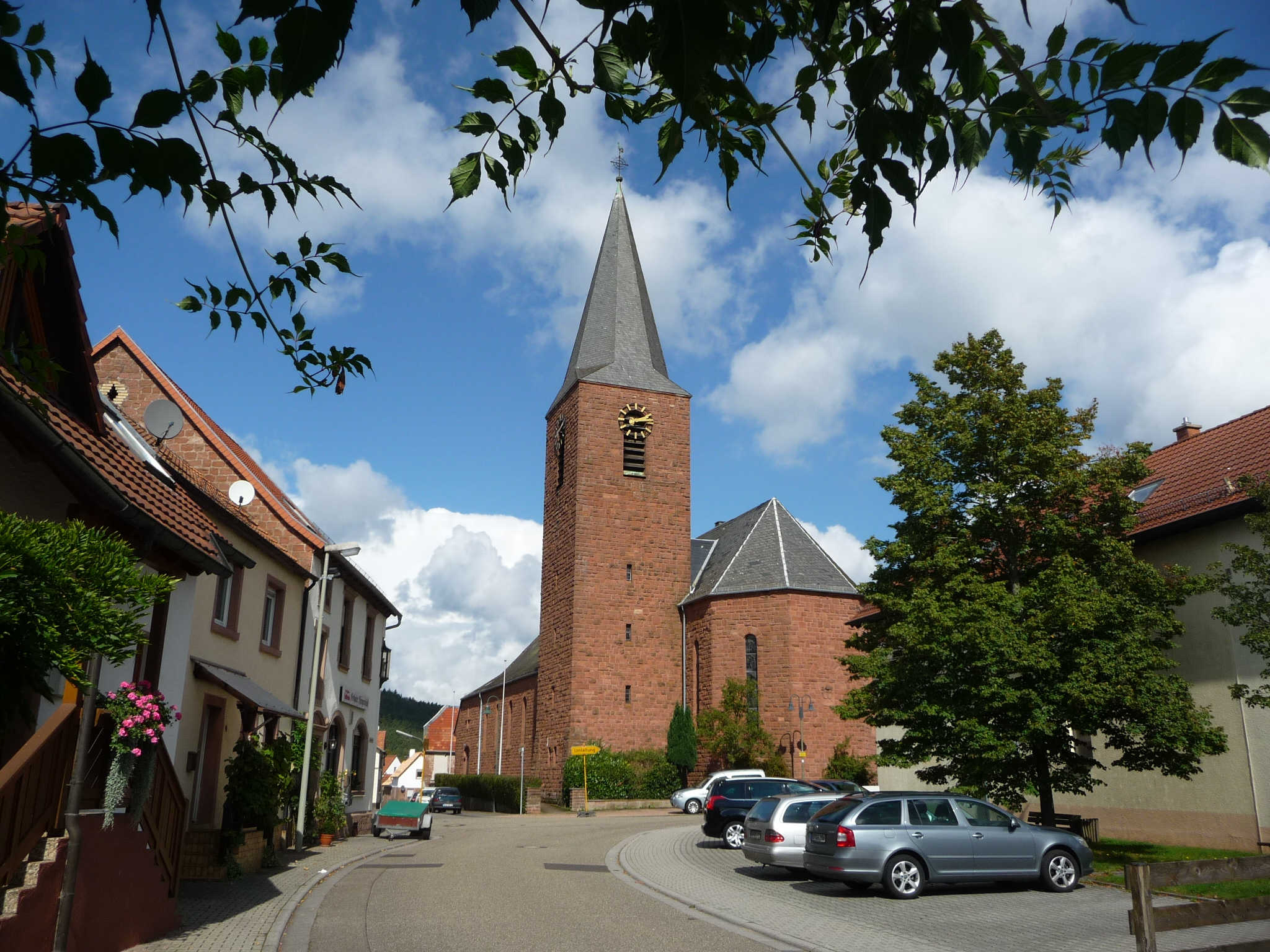 Die 1933/34 erbaute katholische Kirche St. Konrad von Parzham (auch Bruder-Konrad-Kirche) steht in der Ortsmitte von Esthal im Pfälzerwald.